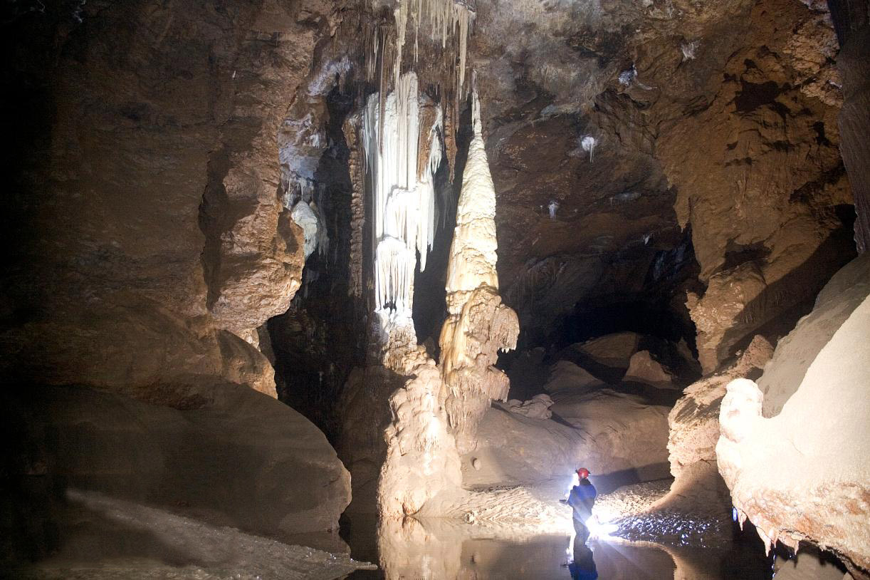 Blautopfhöhle - Otriven